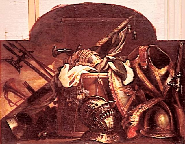 TROPHEES D'ARMES ET INSTRUMENTS MILITAIRES ; Salon : Antichambre de la reine, Grands appartements du Château de Versailles Emplacement : dessus-de-port